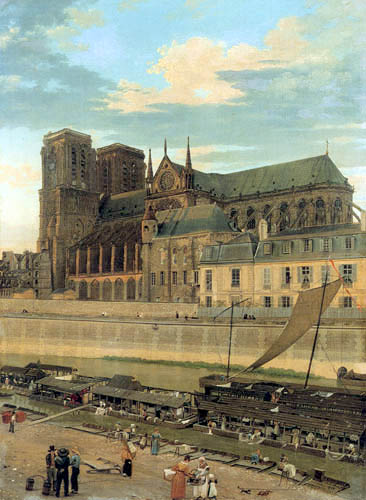 Kathedrale Notre-Dame de Paris und erzbischöflicher Palast, 1827